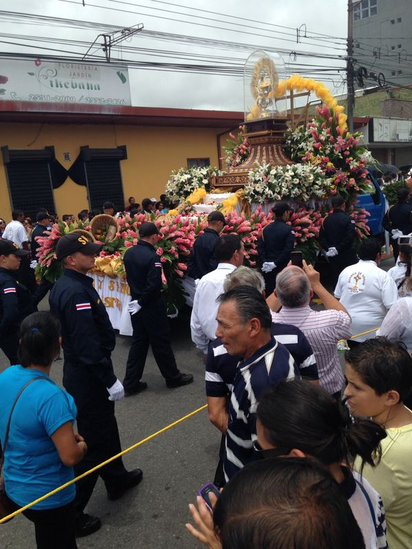 Pasada de la Negrita en Cartago, 6 septiembre de 2014. Costa Rica.